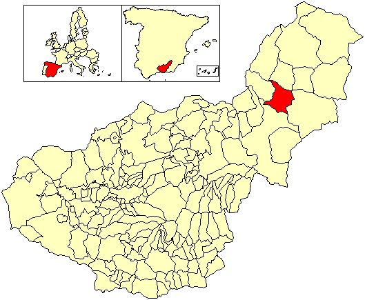 Situación del término municipal de Benamaurel respecto a la provincia de Granada, en España.